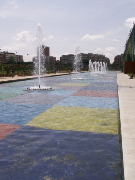 Centro de ocio y deportes del Canal de Isabel II en el tercer depósito del Canal de Isabel II. En la manzana formada por Avenida de Islas Filipinas, calle de Santander y paseo de San Francisco de Sales. Estanque y fuentes.